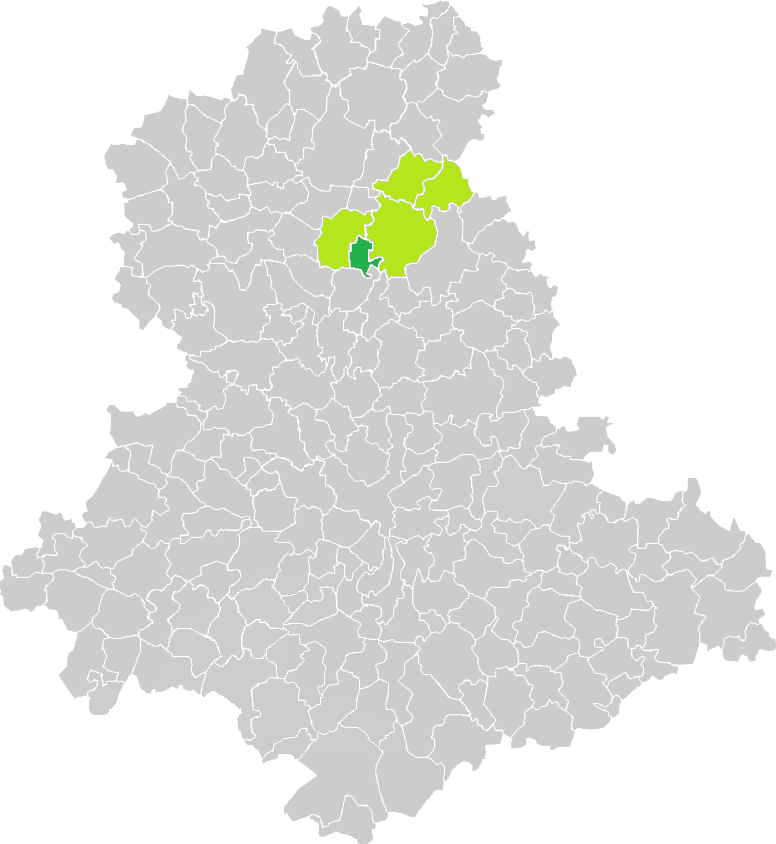 Carte de situation de la commune de Balledent (en vert foncé) dans le votre Canton (en vert clair) sur une carte des communes de la Haute-Vienne